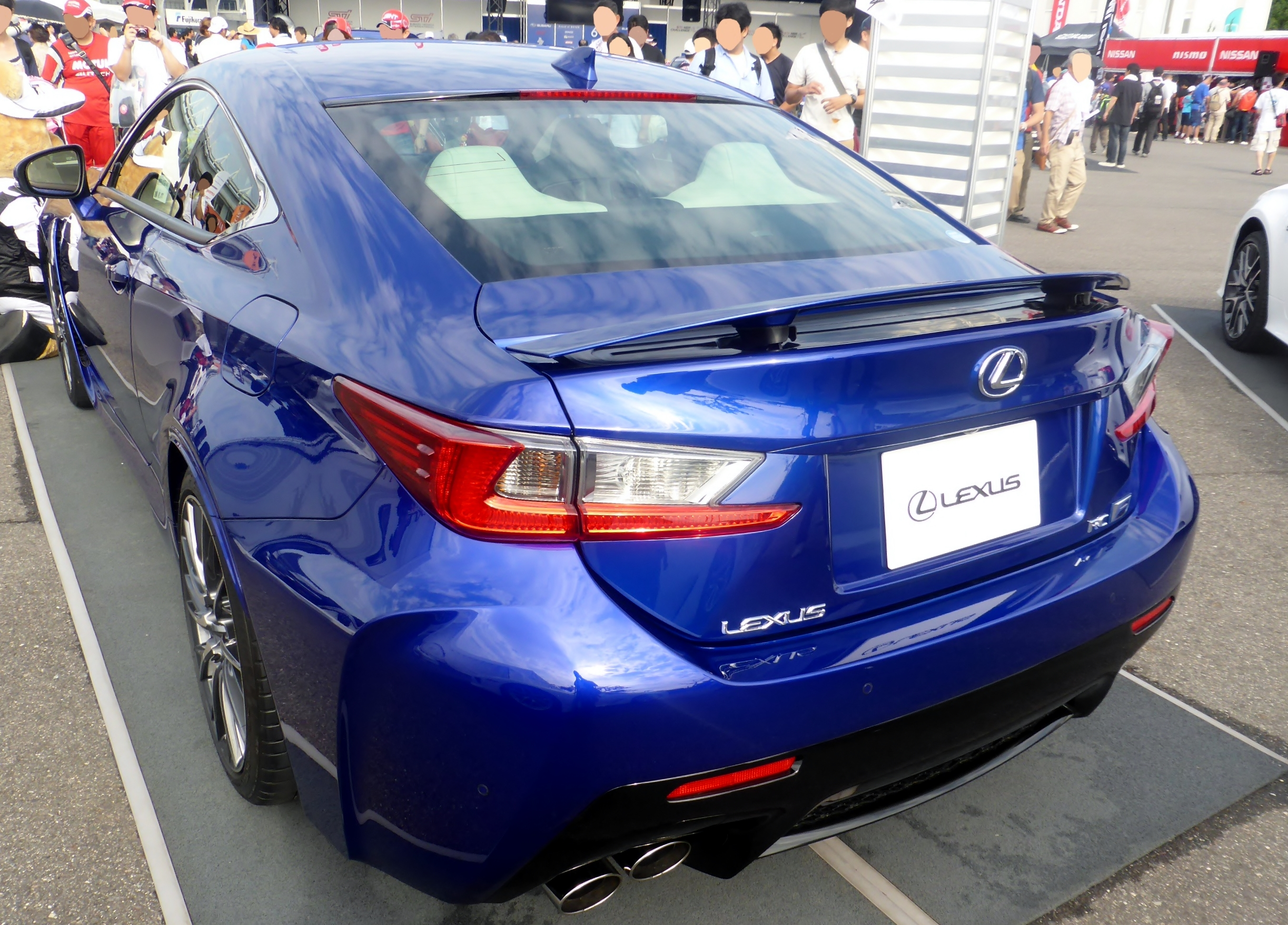 レクサス・RC Fをリアから撮影。